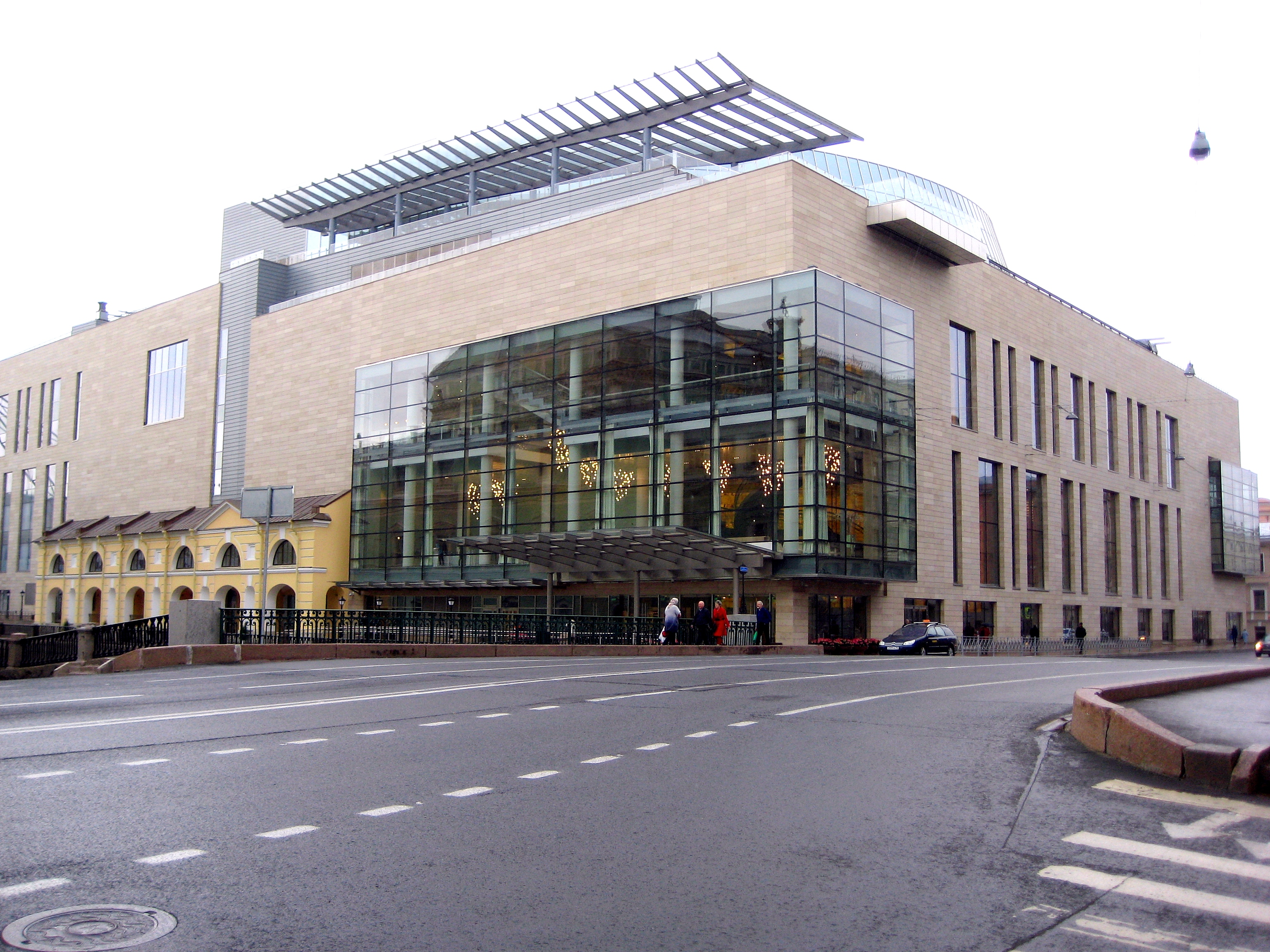 Мариинский театр. Вторая сцена.